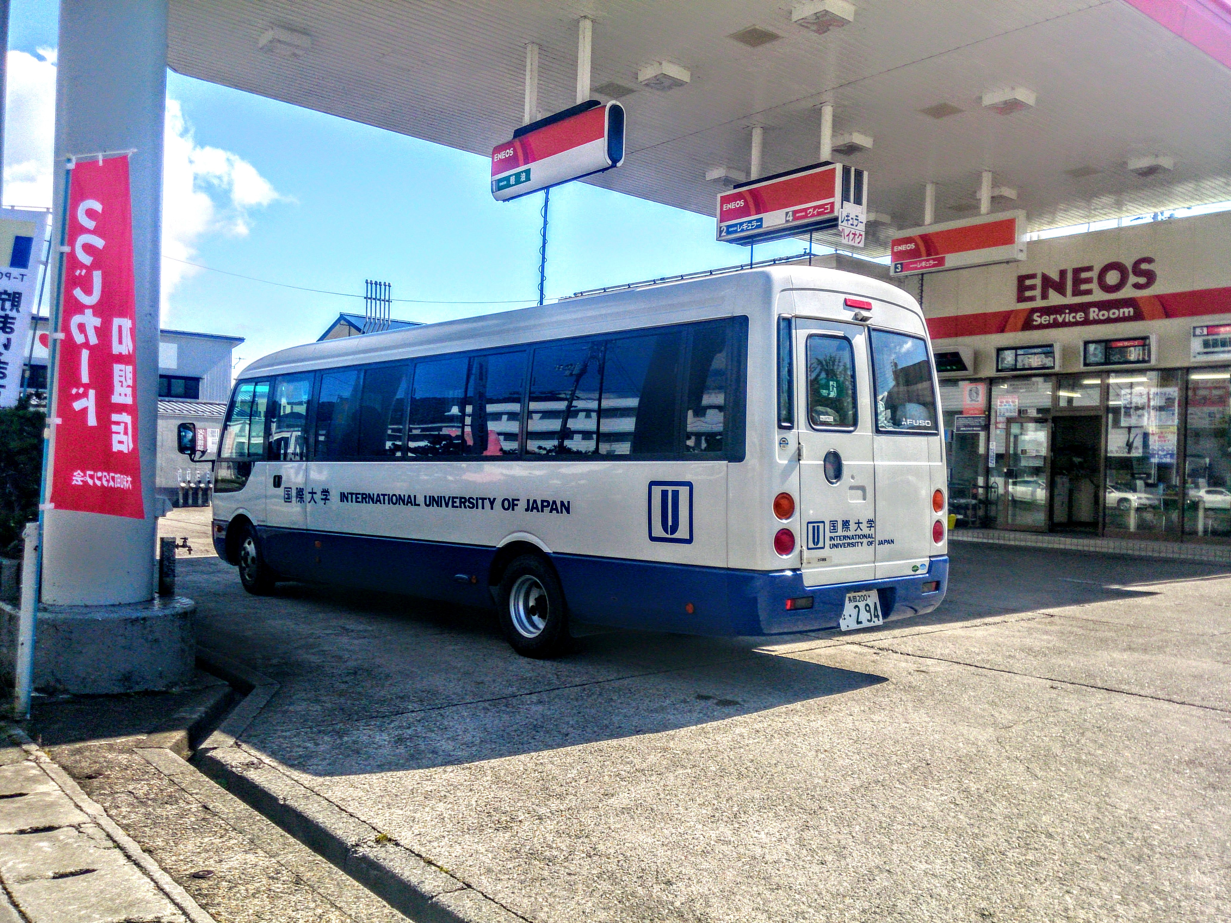 国際大学のスクールバス